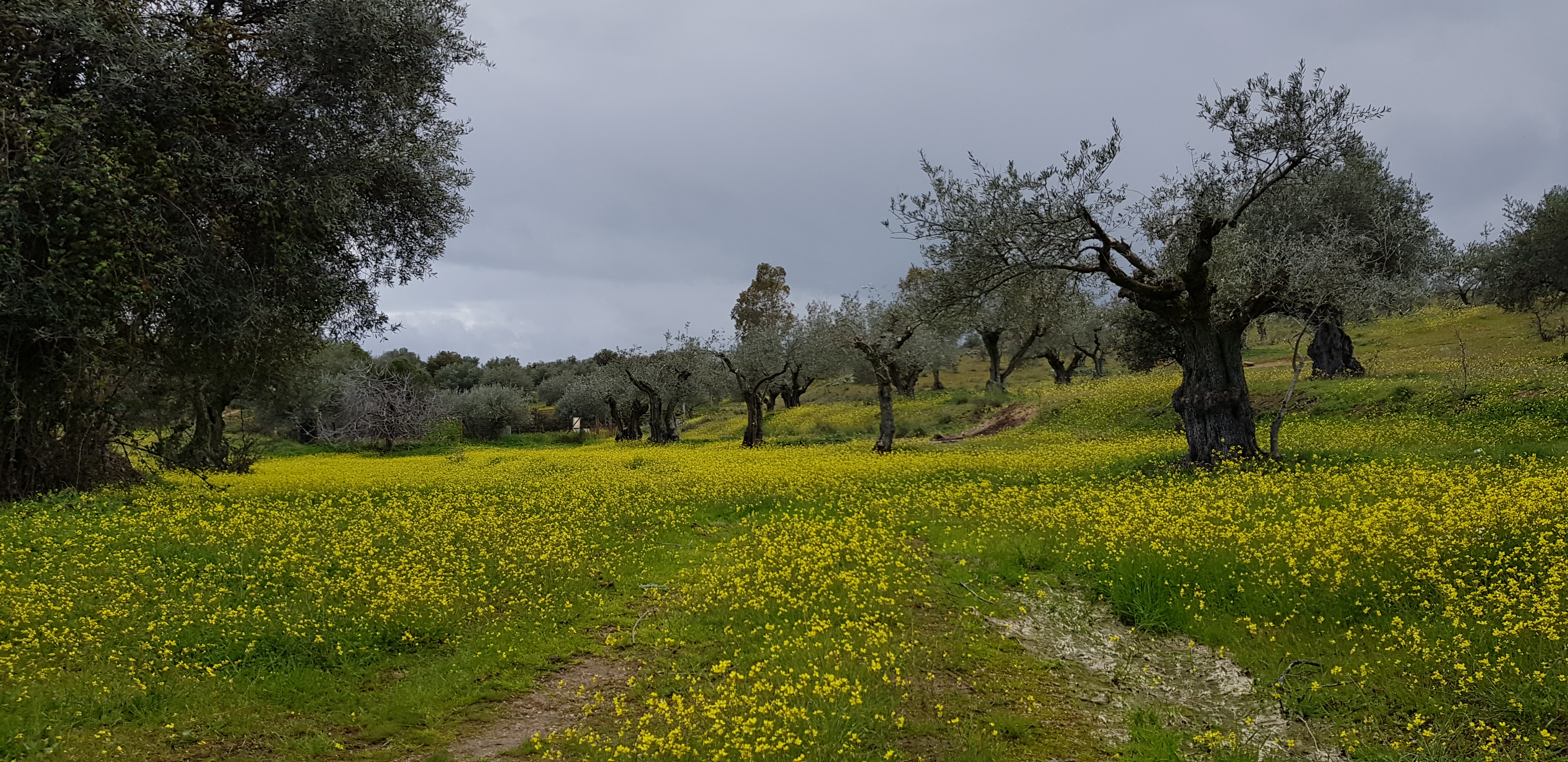 Ejemplo de flora de Herreruela